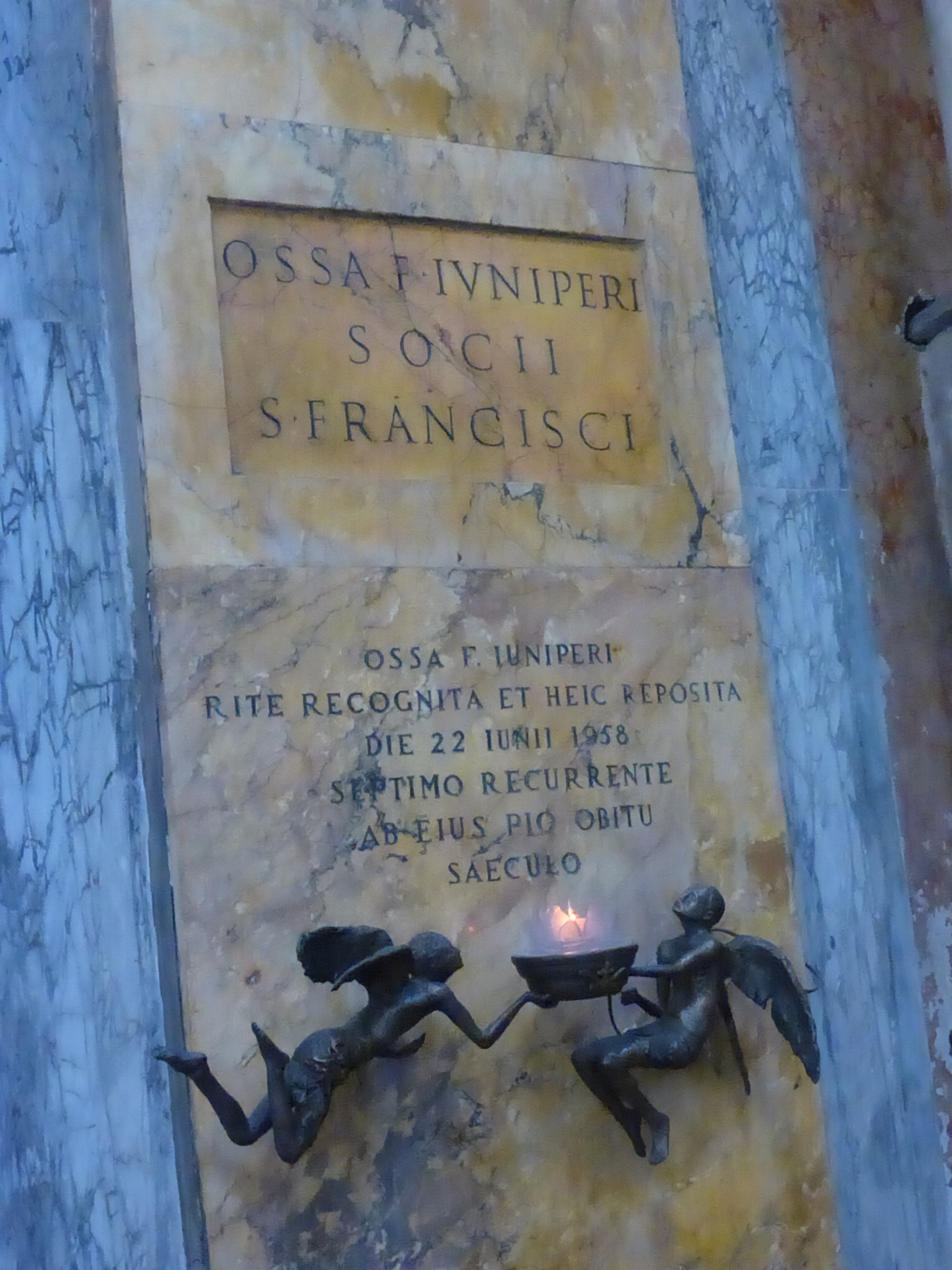 Roma, S. Maria in Aracoeli. Ossa Frati Iuniperi (Sepolcro di fra' Ginepro, 1958)